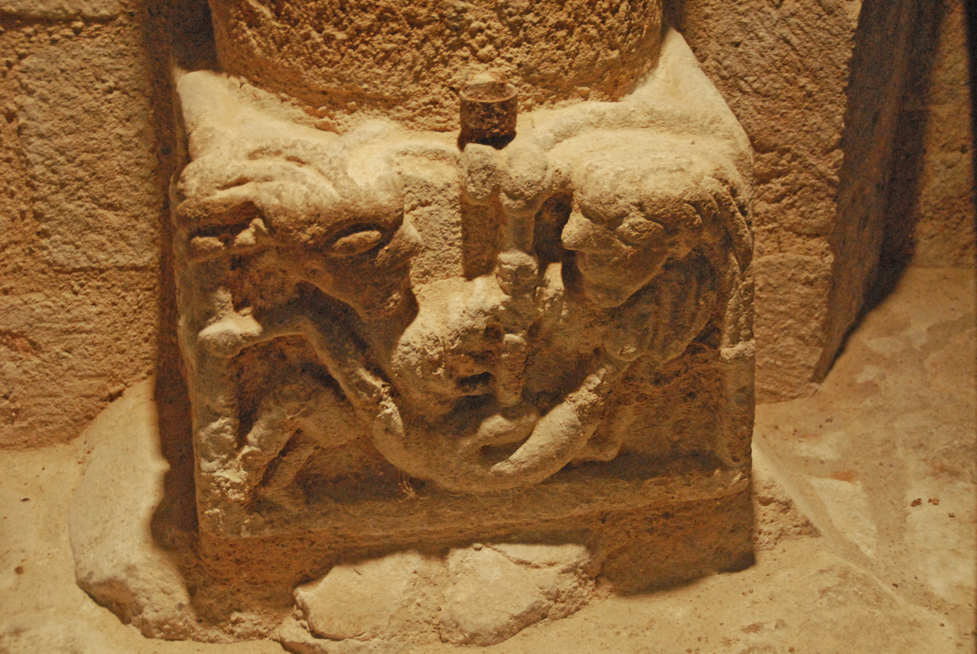 Neuvy_St.-Sépulcre, Rotunde, Dienstbasis